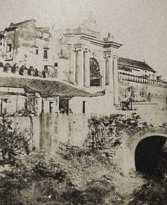 La Puerta de Jerez. Calotipo a la cera. A continuación se observa el puente sobre el arroyo Tagarete.